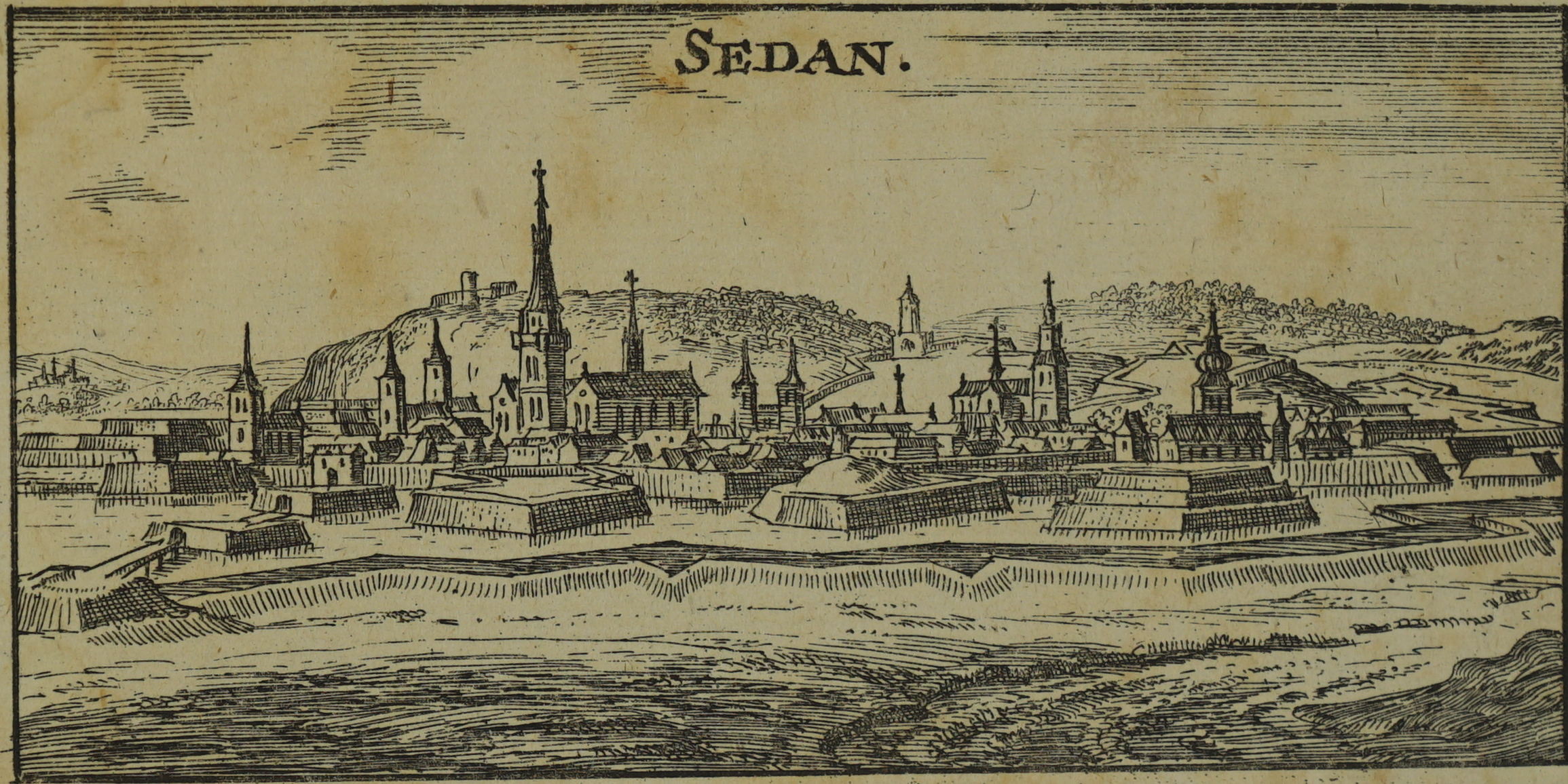 sur un dessin de Tassin.